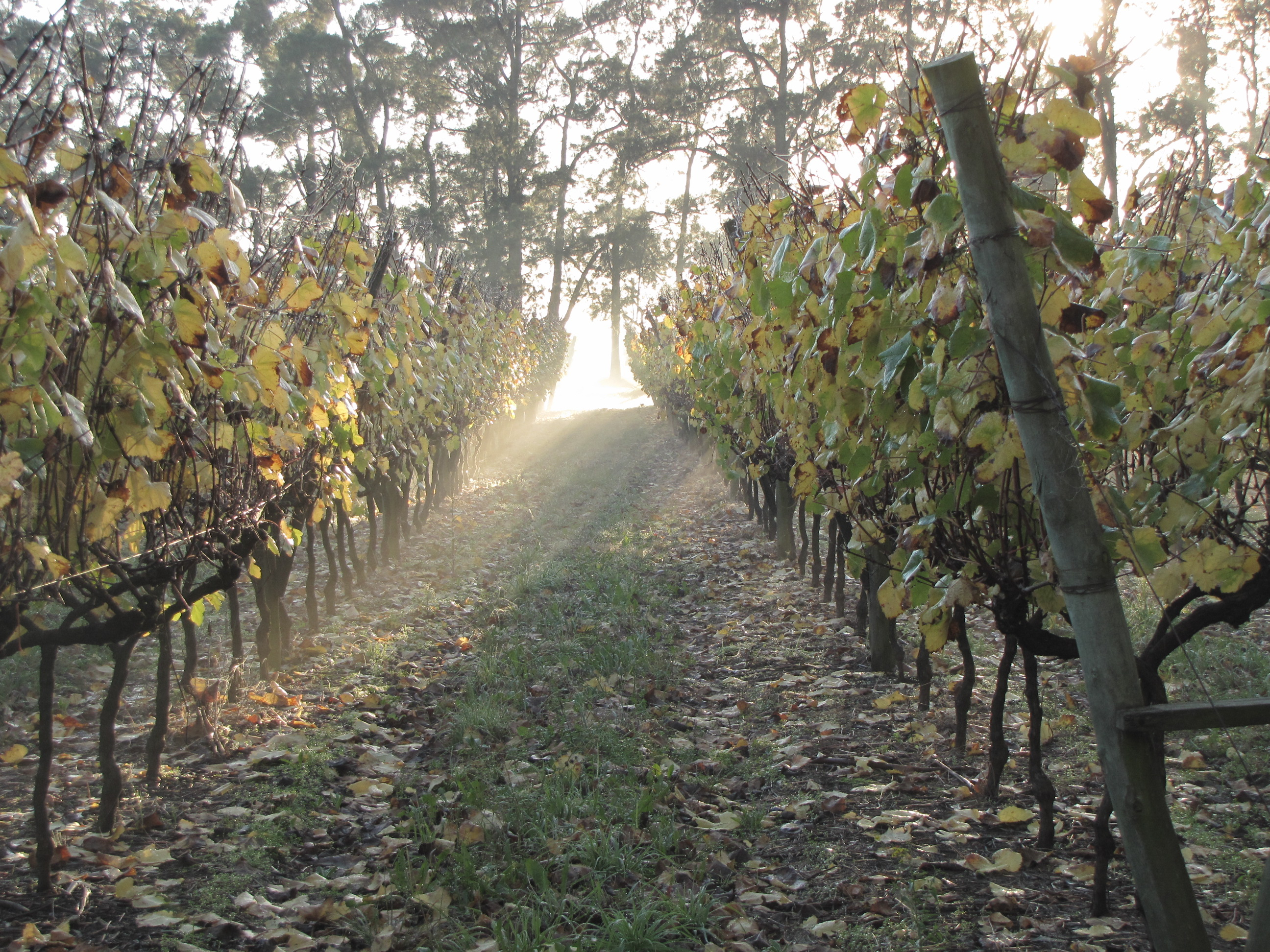 Viña en Otoño